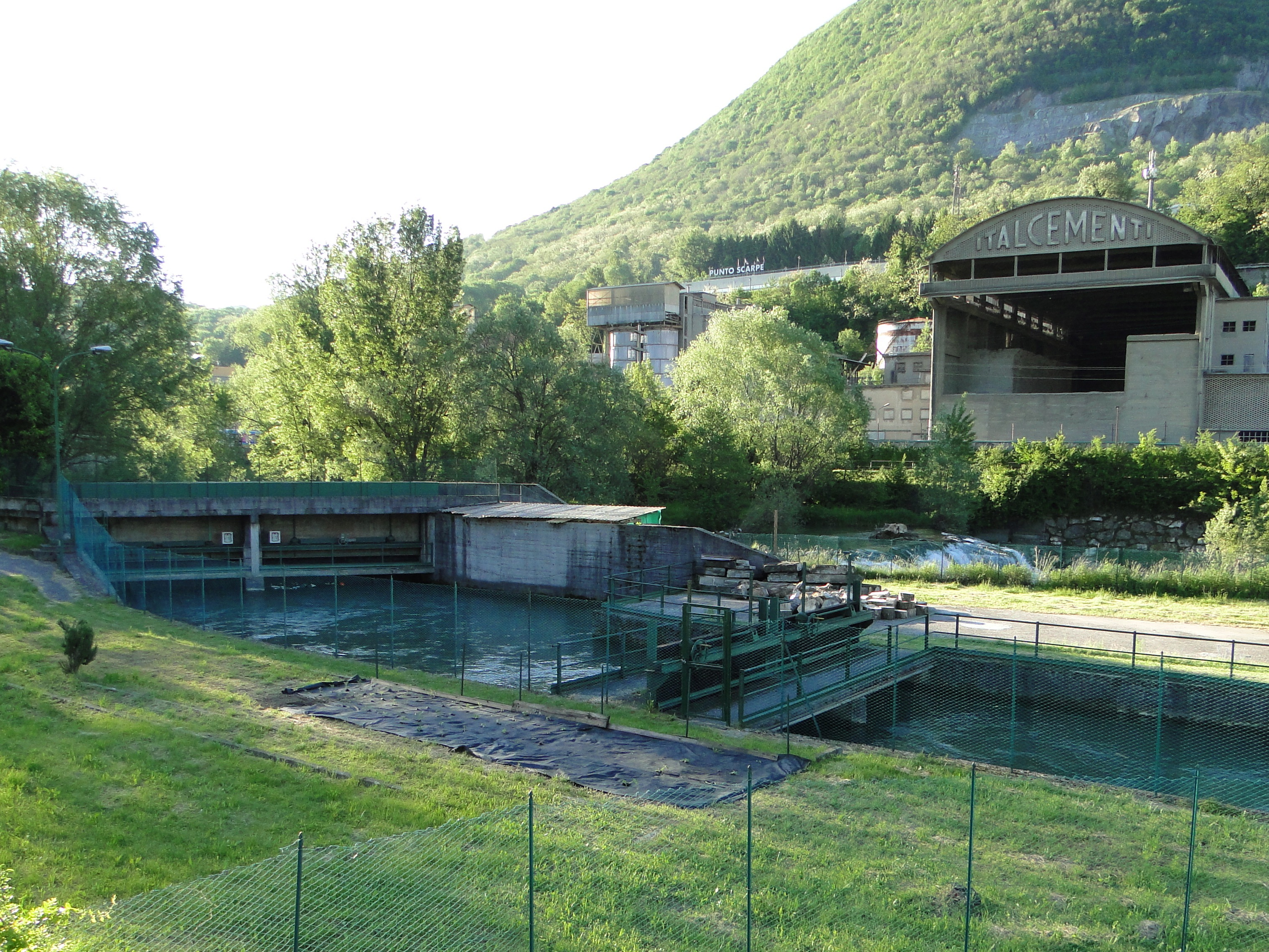 Albino (BG). Bocche di presa sul fiume Serio per rogge Serio Grande, Borgogna e Molrlana